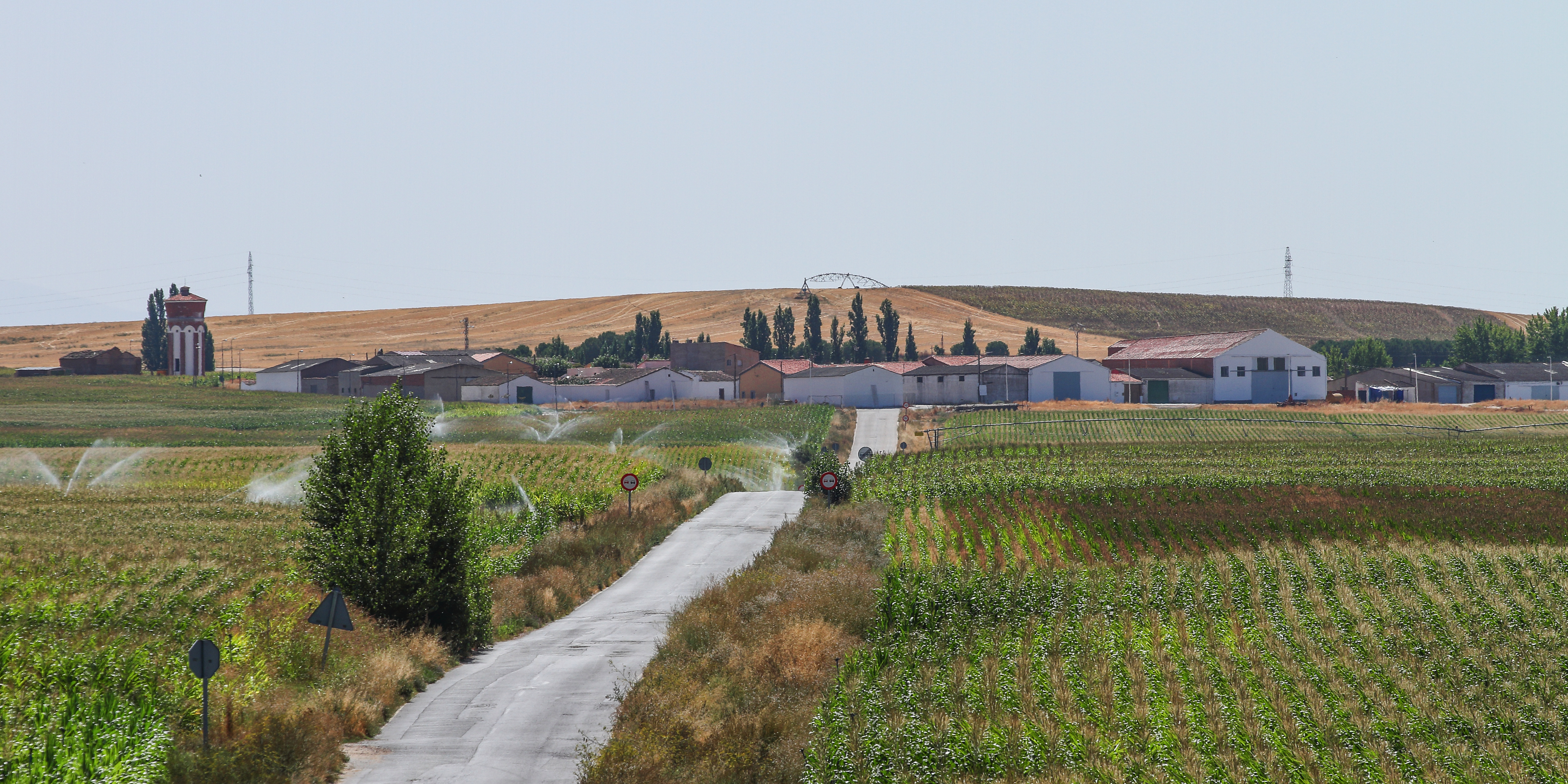 Cordovilla, vista de la población desde carretera DSA-652